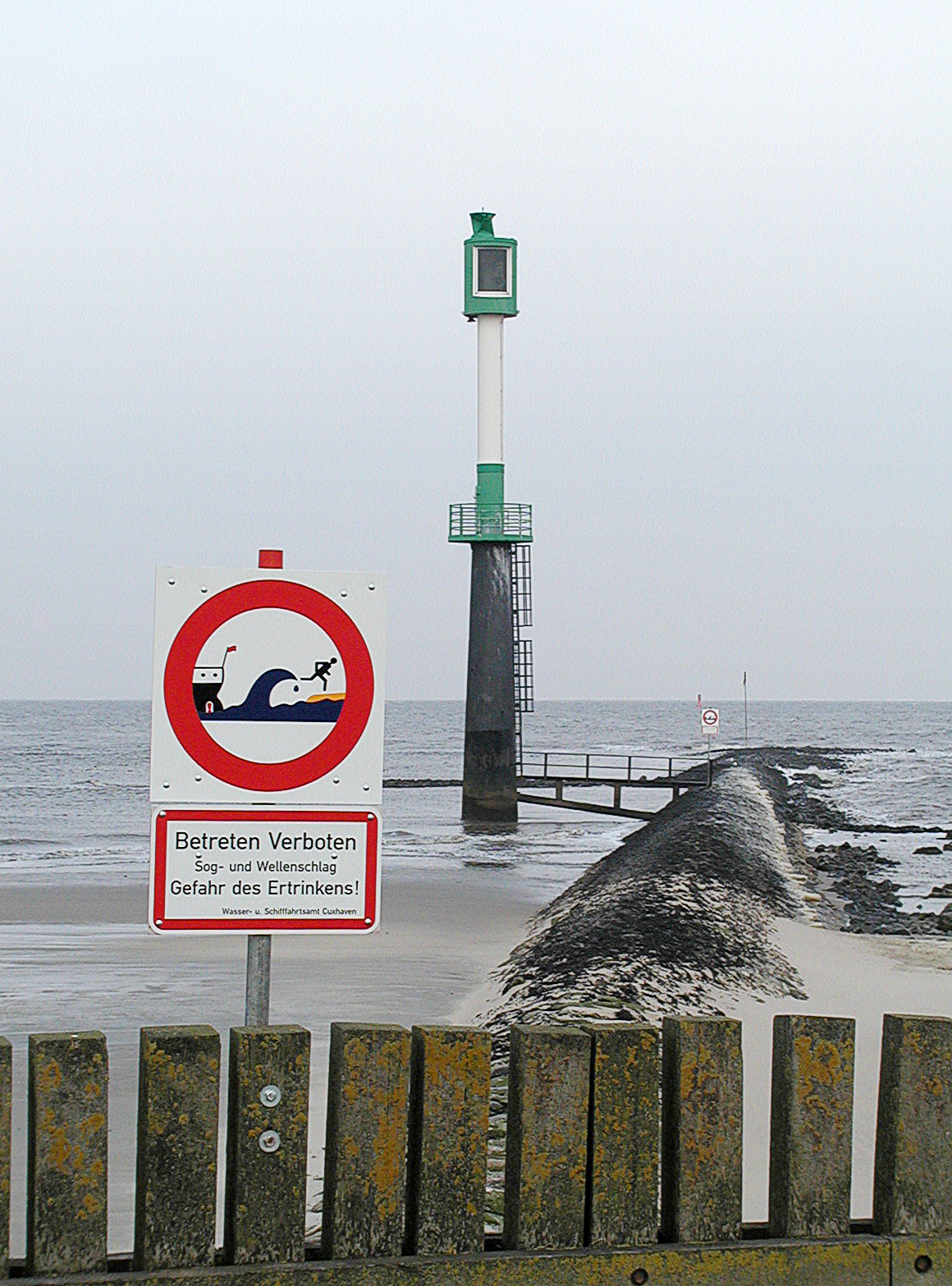 Die neuen Schilder am Glameyer Stack warnen vor Wellen in diesem Bereich